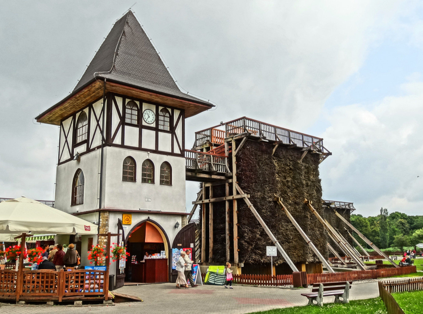 Park Solankowy w Inowrocławiu, tężnie